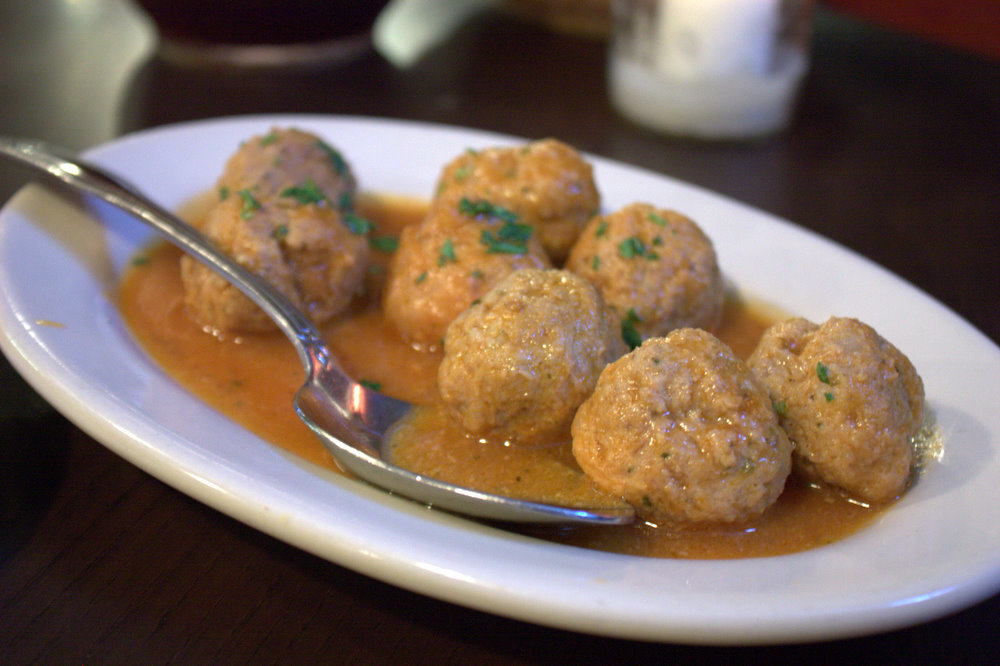 Unas albóndigas, servidas en Manhattan, Nueva York.